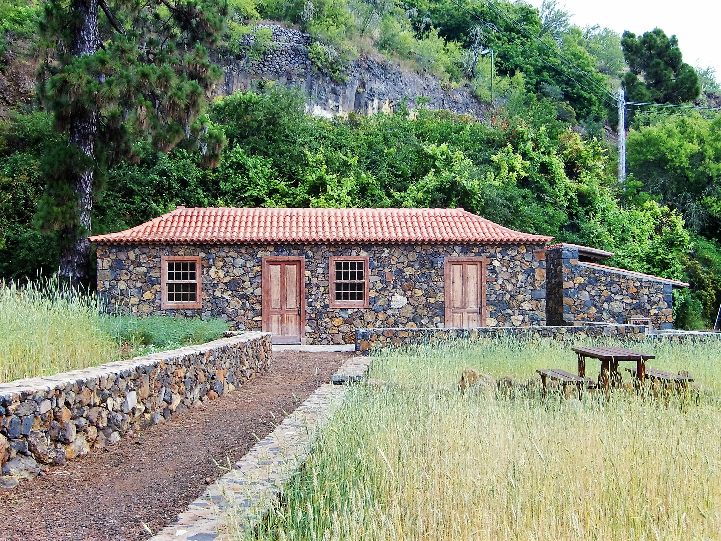 Casa rural de piedra en Puntagorda, Isla de la Palma